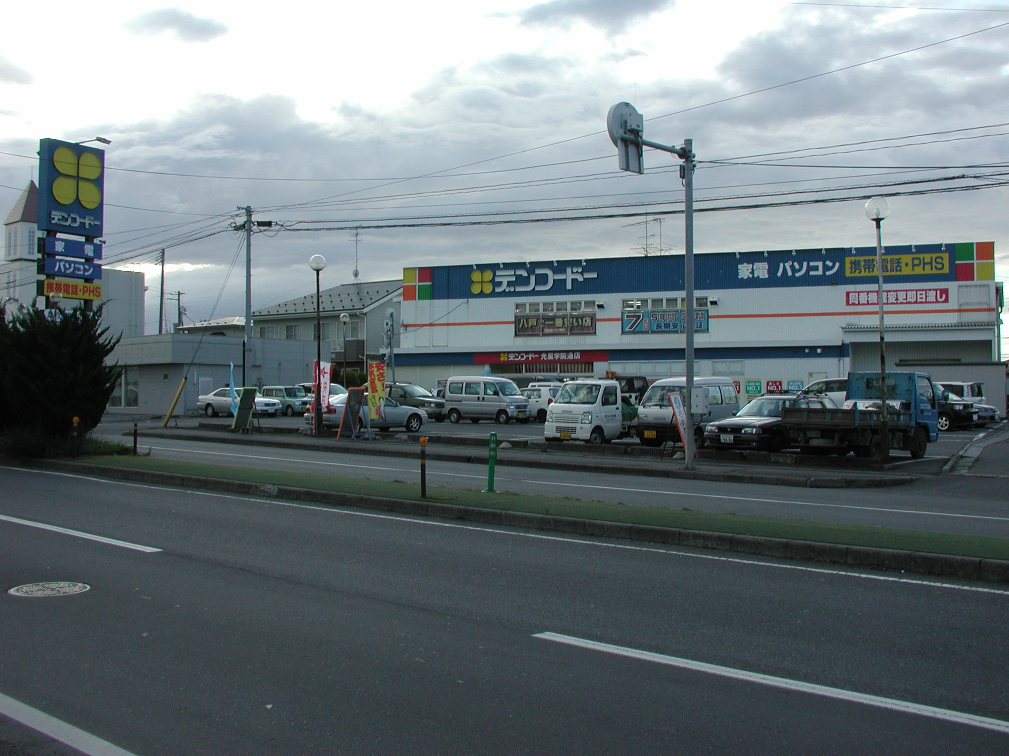 デンコードー：光星学院通店（撮影当時） ※：2007年12月6日付けで、店舗名を「ケーズデンキ光星学院通店By Denkodo」に改称。